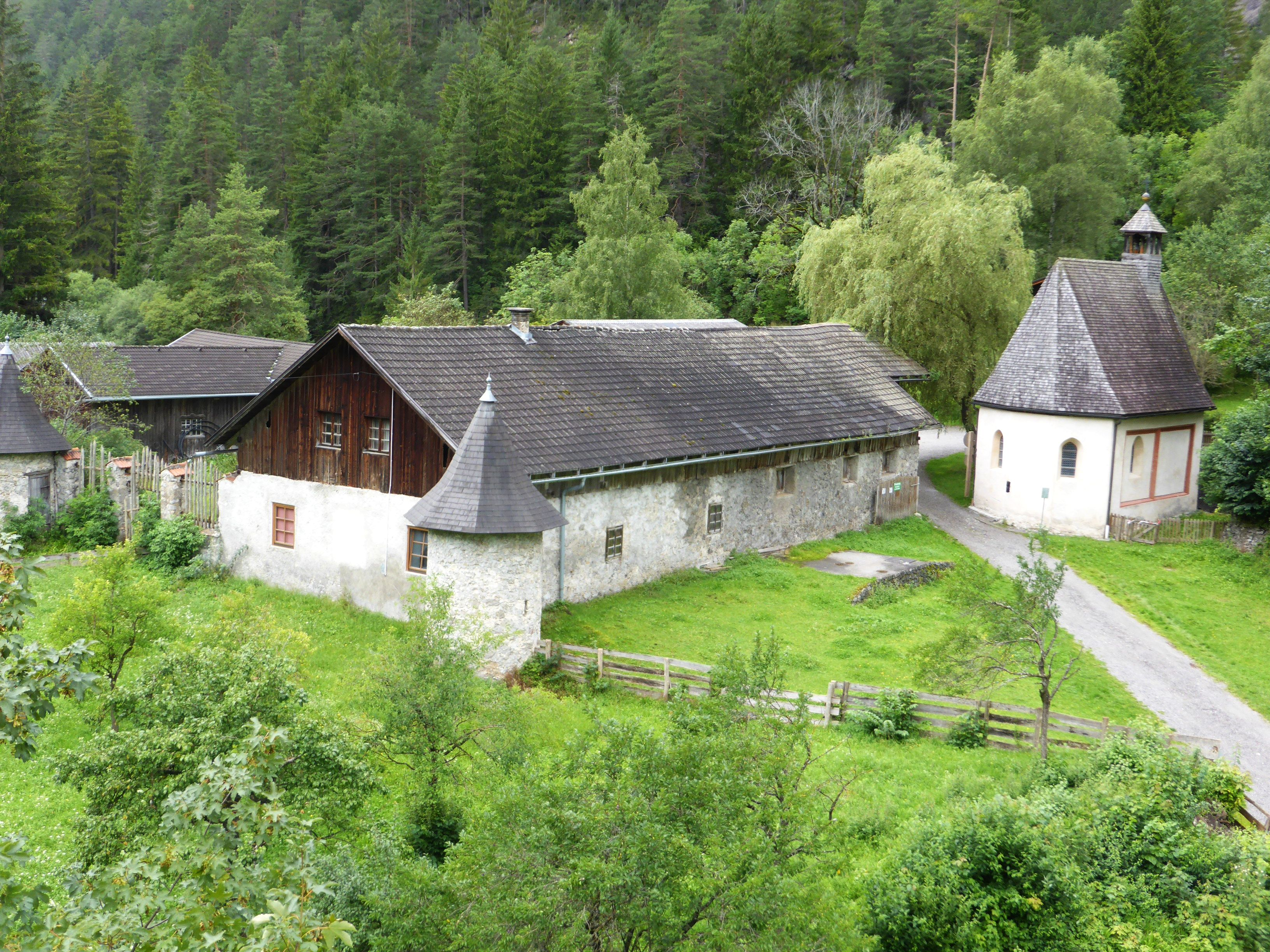 Das Niederhaus von Schloss Fernstein/Klause Fernstein dient aktuell als Wirtschaftsgebäude. Rechts die alte Nothelferkapelle. This media shows the remarkable cultural object in the Austrian state of Tyrol listed by the Tyrolean Art Cadastre with the ID 141004. (on tirisMaps, pdf, more images on Commons, Wikidata)